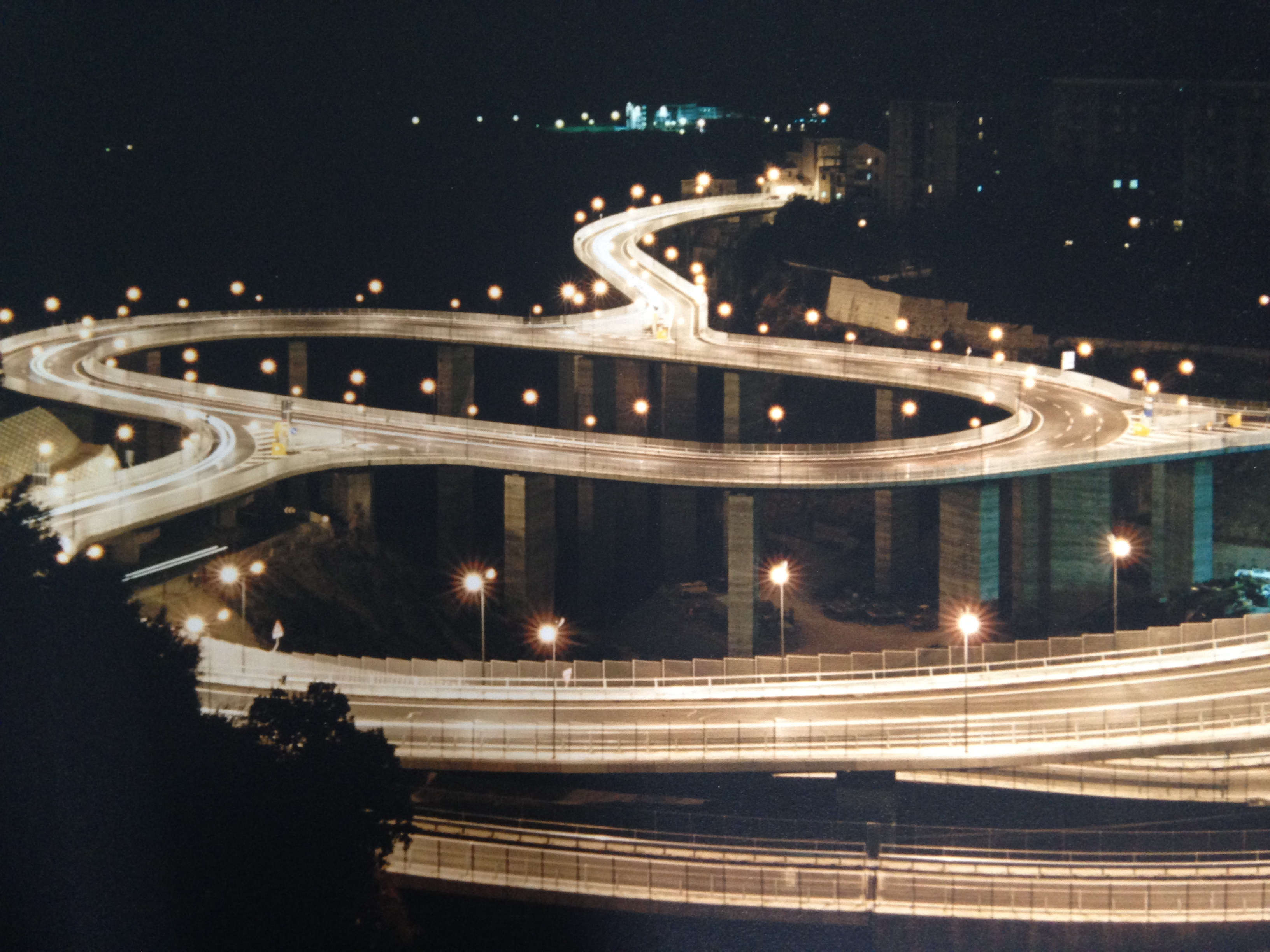 Rotatoria Gualtieri, Catanzaro, progettata da Benito Gualtieri fotografia propria